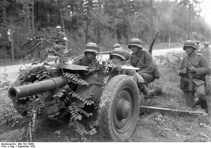 Die grossen Reichswehrmanöver in Frankfurt a/Oder, welche im Beisein des Reichspräsidenten von Hindenburg stattfanden ! Eine getarnte Holzkanone auf Gummirädern im Manövergelände sichert eine Anfahrtsstrasse.